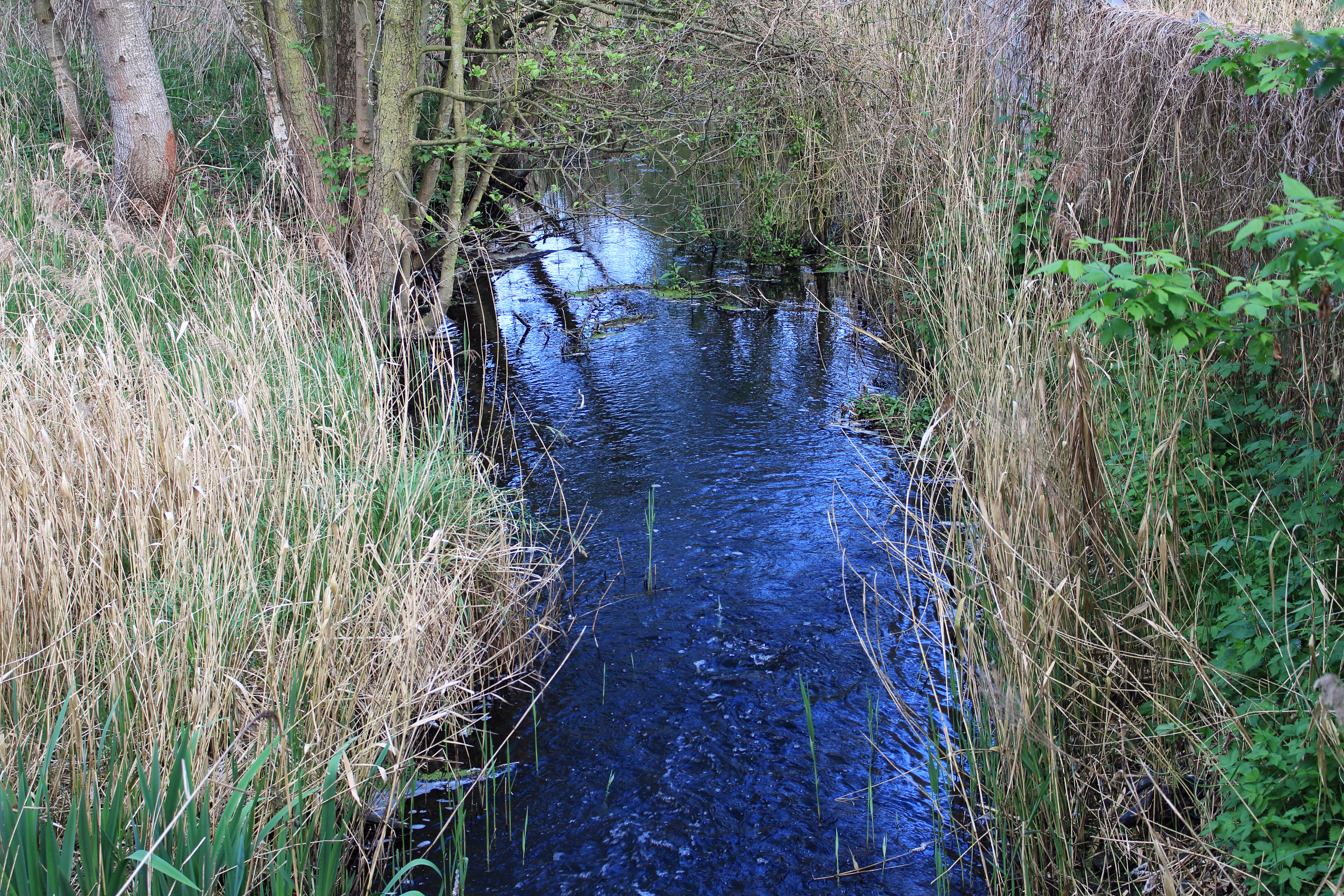 Tegeler Fließ in Brandenburg